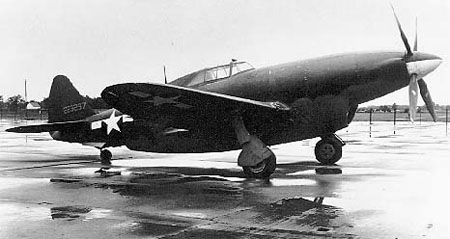 Republic XP-47H